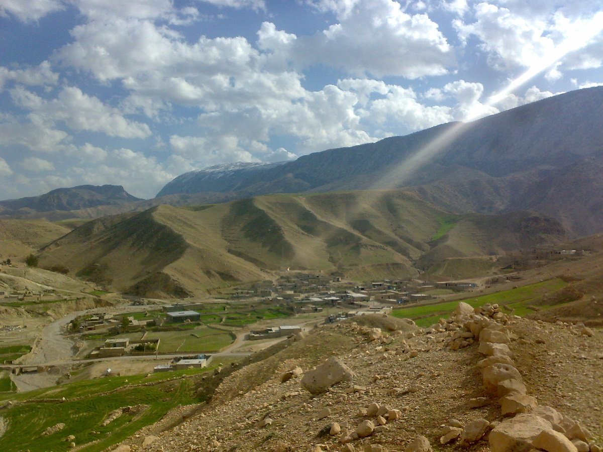 روستای دره بنیباب-طایفه محمدموسایی, مدمیسا, گل محمد مدمیسایی, جاذبه های گردشگری باغملک, باغملک, روستای دره بنیاب